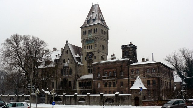 Das Faber-Castell'sche Schlo� in Stein